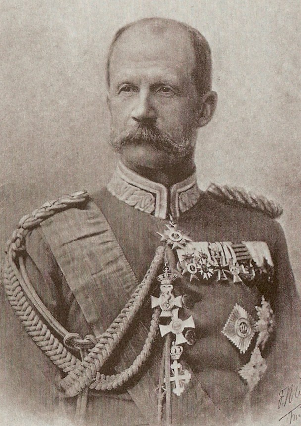 Eugen Ritter von Keller (1843-1938), königlich bayerischer Generalleutnant